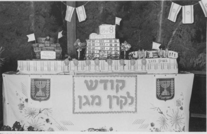 יום התרמה לקרן המגן - תערוכה